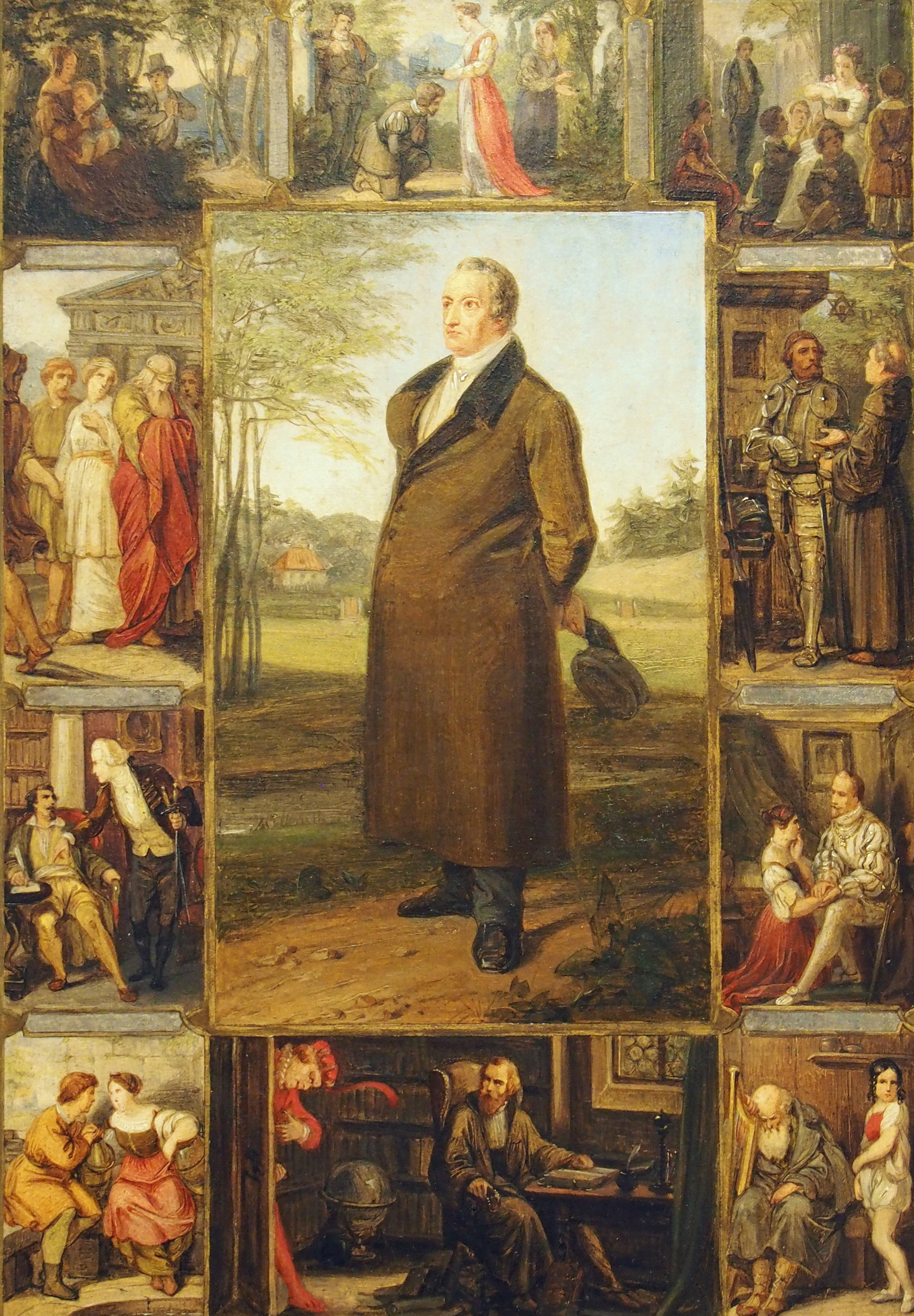 Umgeben von Illustrationen zu „Der Wanderer“, „Torquato Tasso“, „Die Leiden des jungen Werthers“, „Götz von Berlichingen“, „Egmont“, „Wilhelm Meisters Lehrjahre“, „Faust I“, „Hermann und Dorothea“, „Clavigo“ und „Iphigenie“